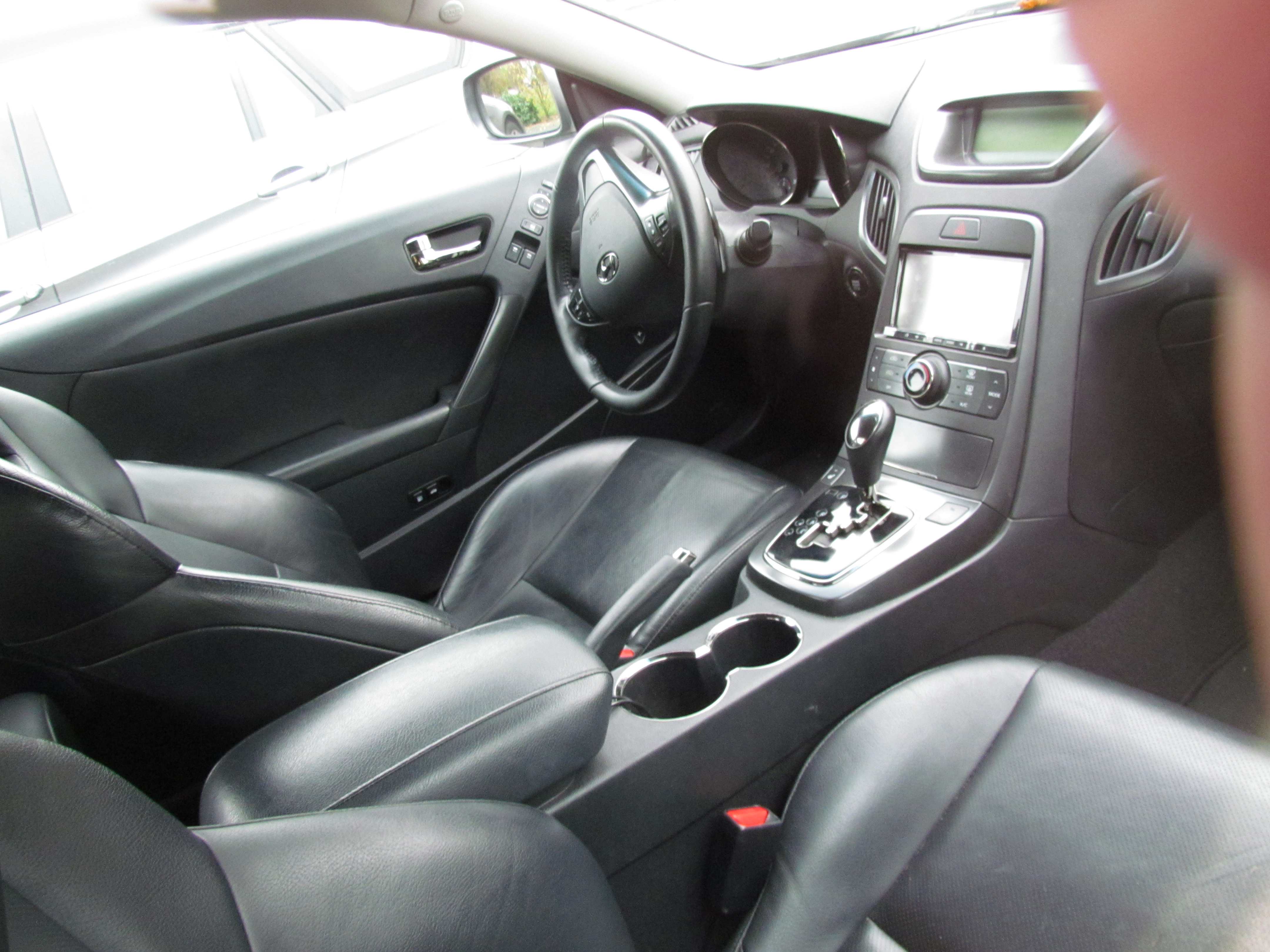 Bildinhalt: Grauer Hyundai mit der Marke "MM" Aufnahmeort: Eggenstein-Leopoldshafen, Deutschland